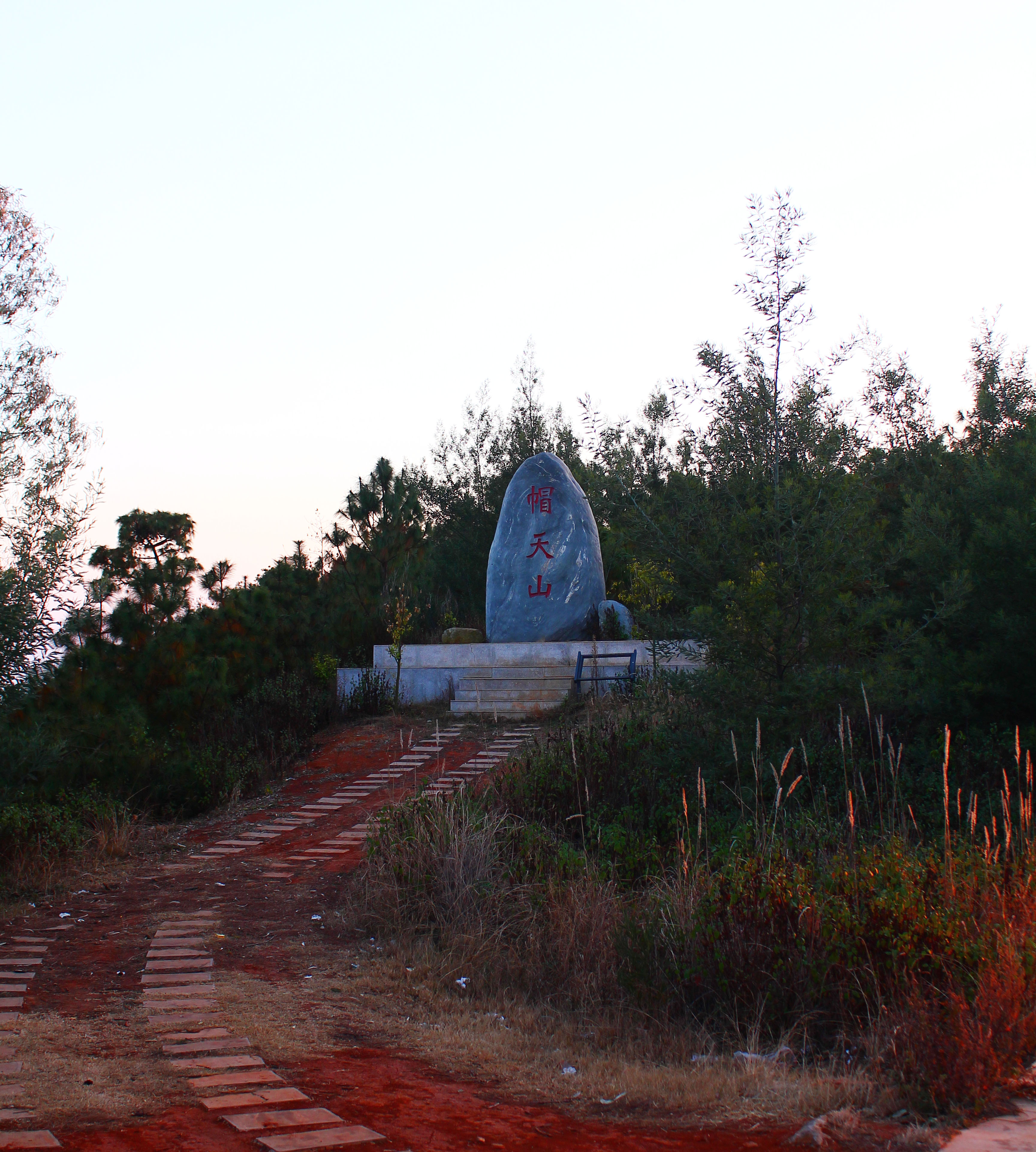 中国云南澄江帽天山